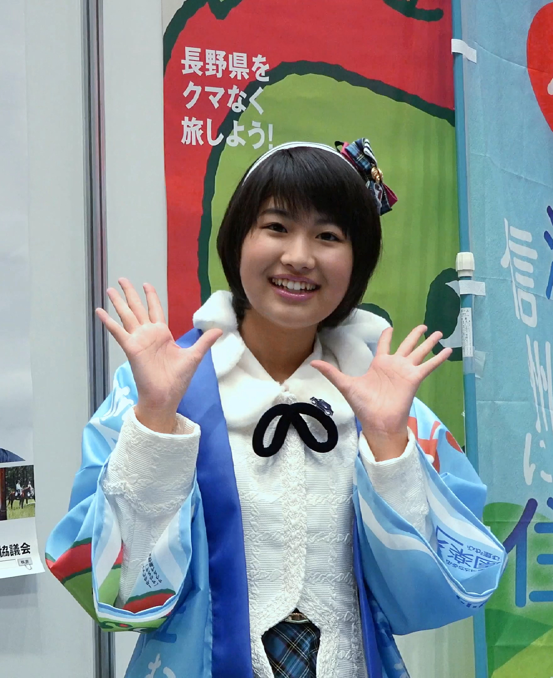 AKB48 チーム8 長野県代表 髙橋彩香（たかはしさやか） イベント初参加ダイジェスト